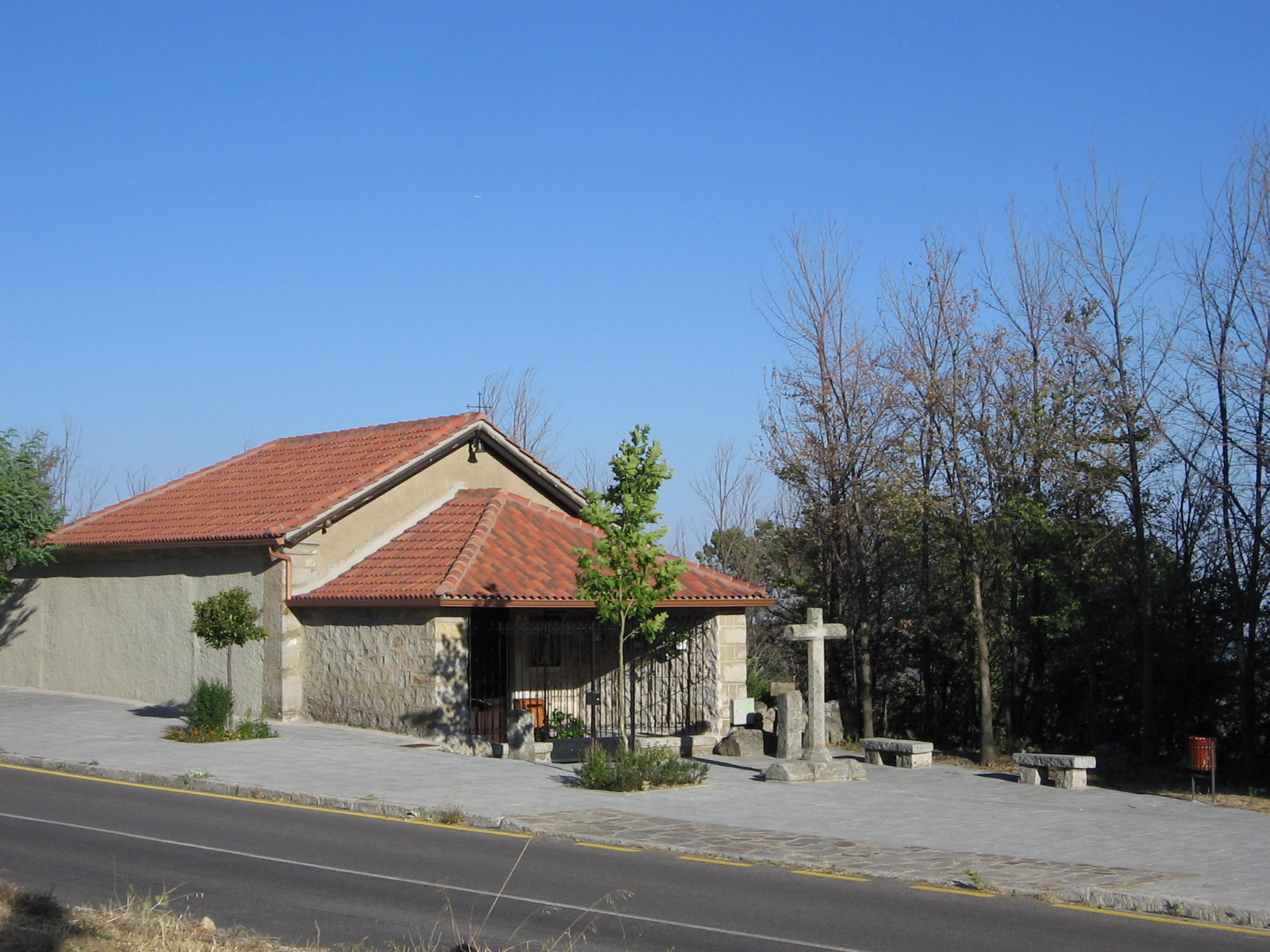 Ermita de Nuestra Señora de la Soledad (Bustarviejo, Madrid)